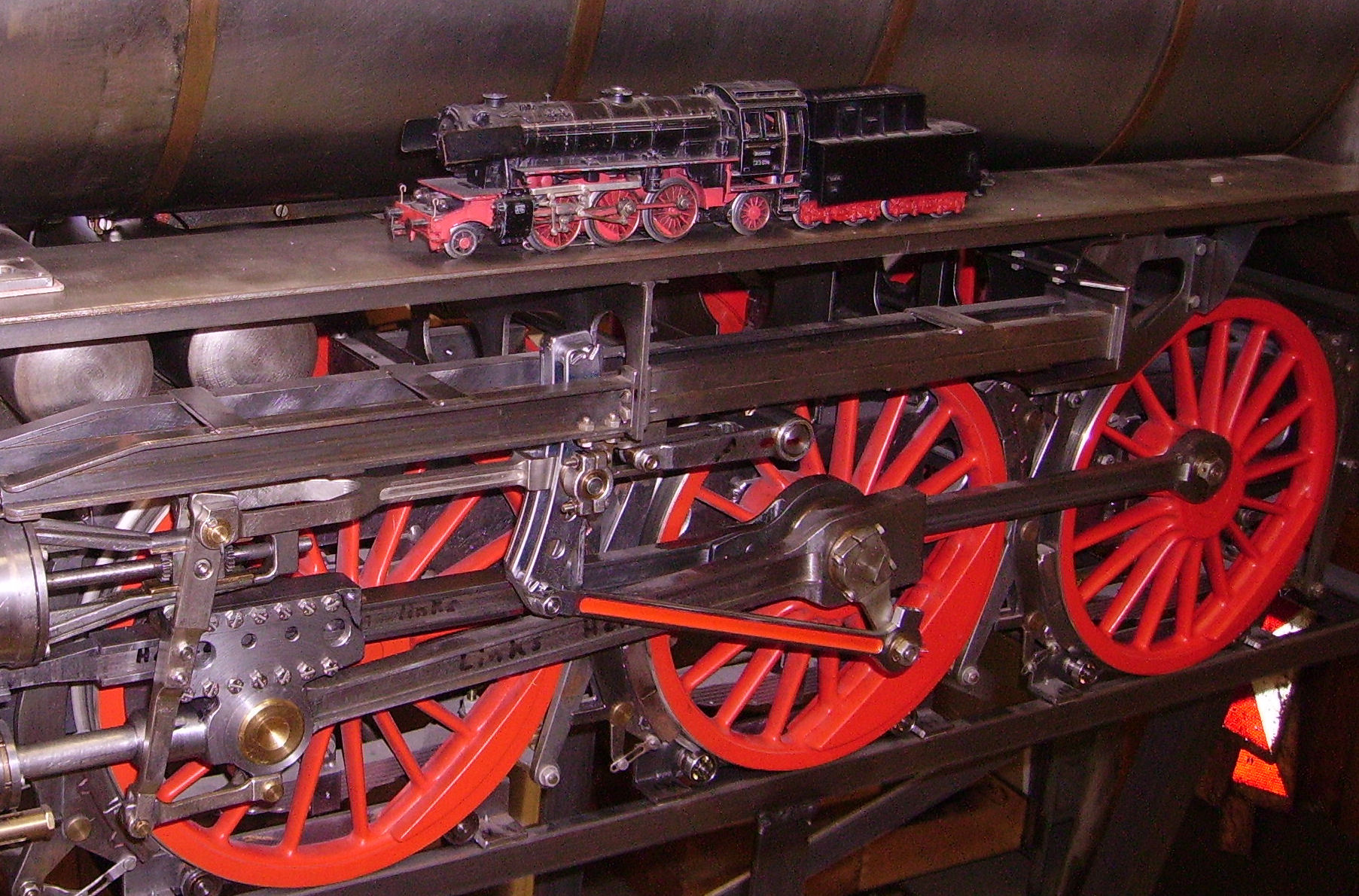 Rail transport modelling in Schifferstadt, Germany